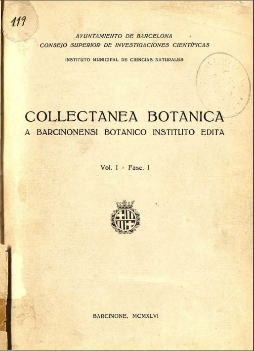 primera portada de la revista Collectanea botanica